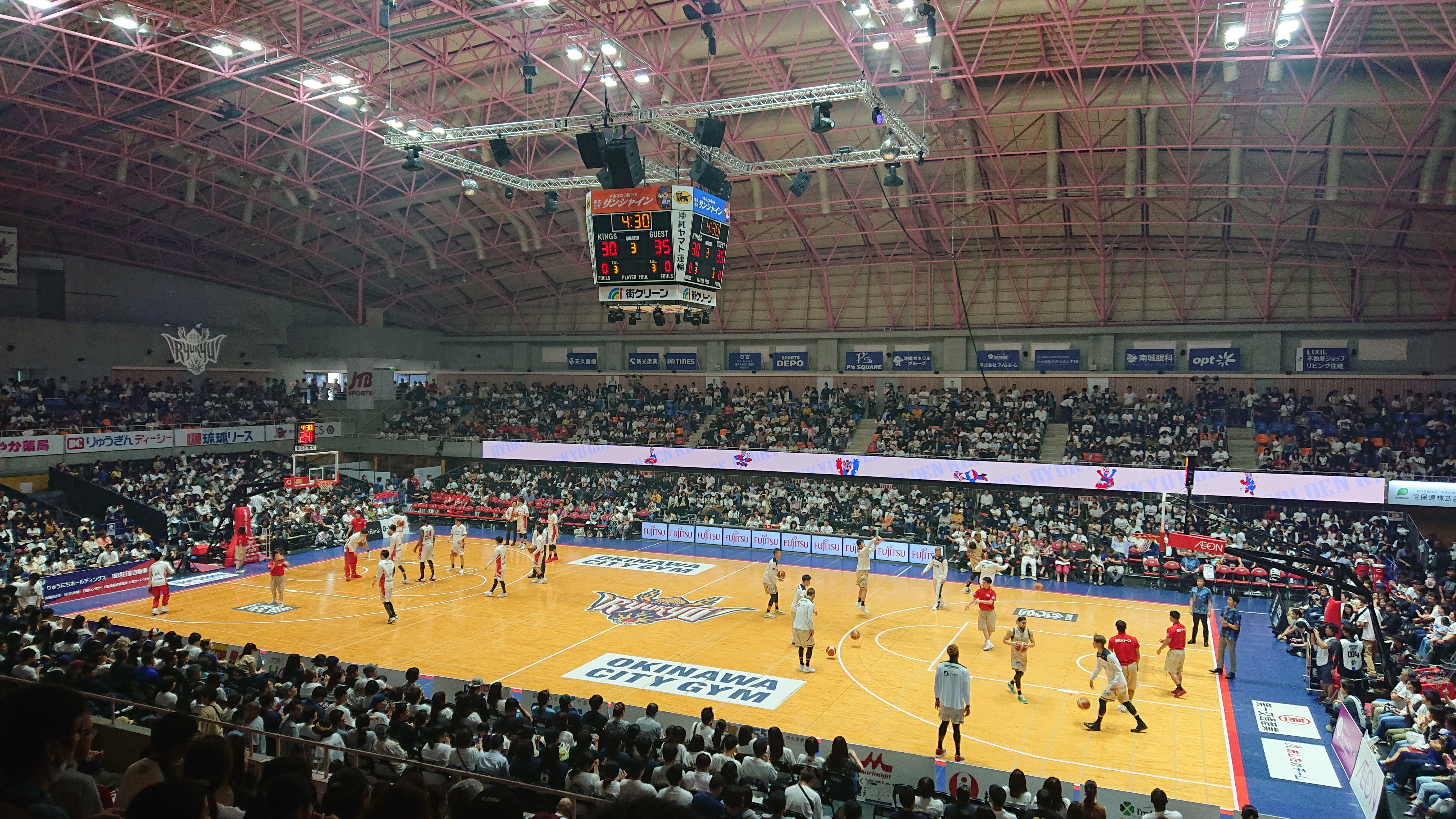 Bリーグチャンピオンシップ2018 - 2019 琉球ゴールデンキングスvs名古屋ダイヤモンドドルフィンズ 第二戦